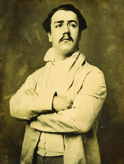 Benjamín Vicuña Mackenna a los 20 años durante su exilio en EE. UU.